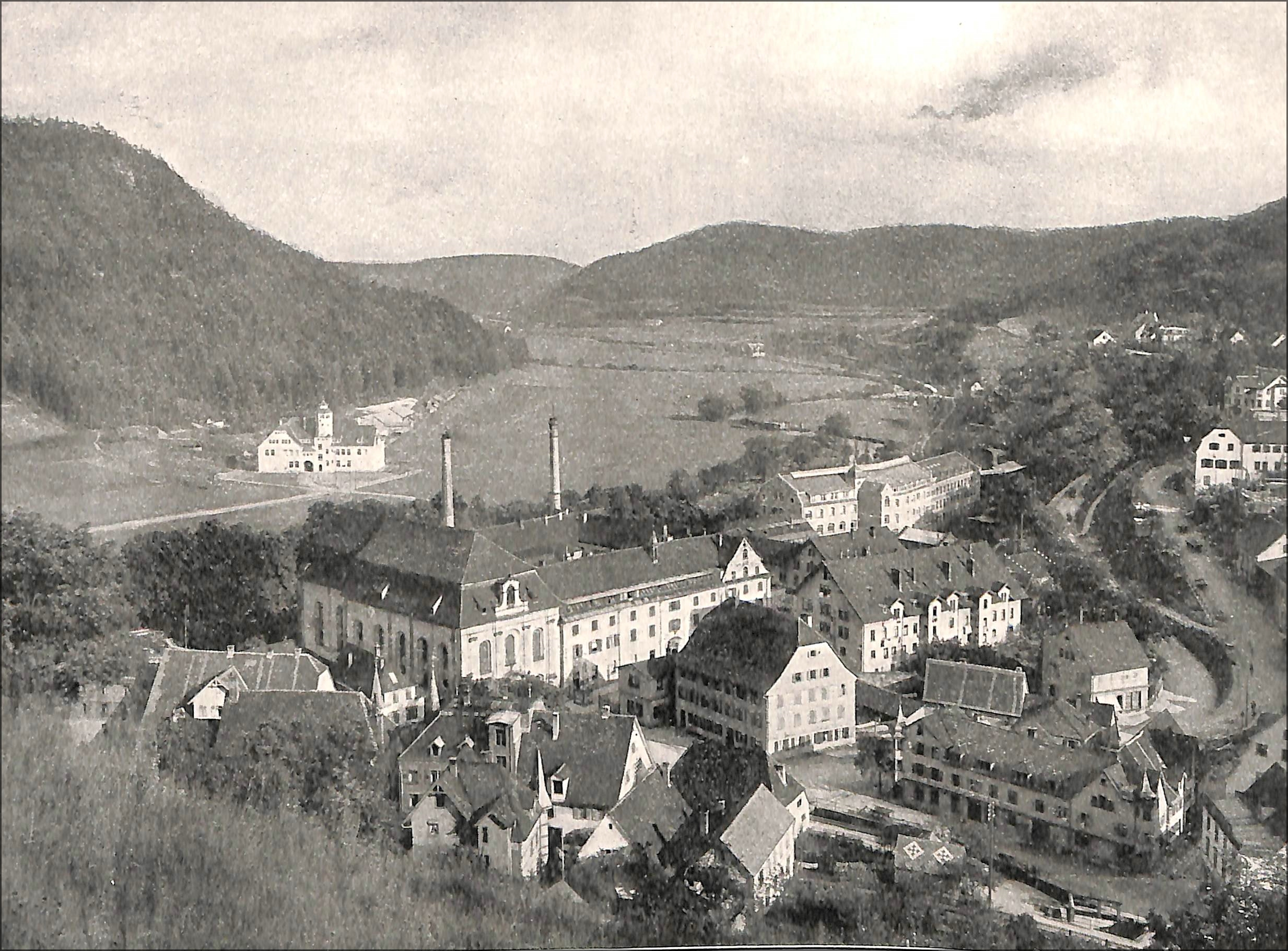 Oberndorf - Ortsansicht mit der Waffenfabrik Mauser AG.